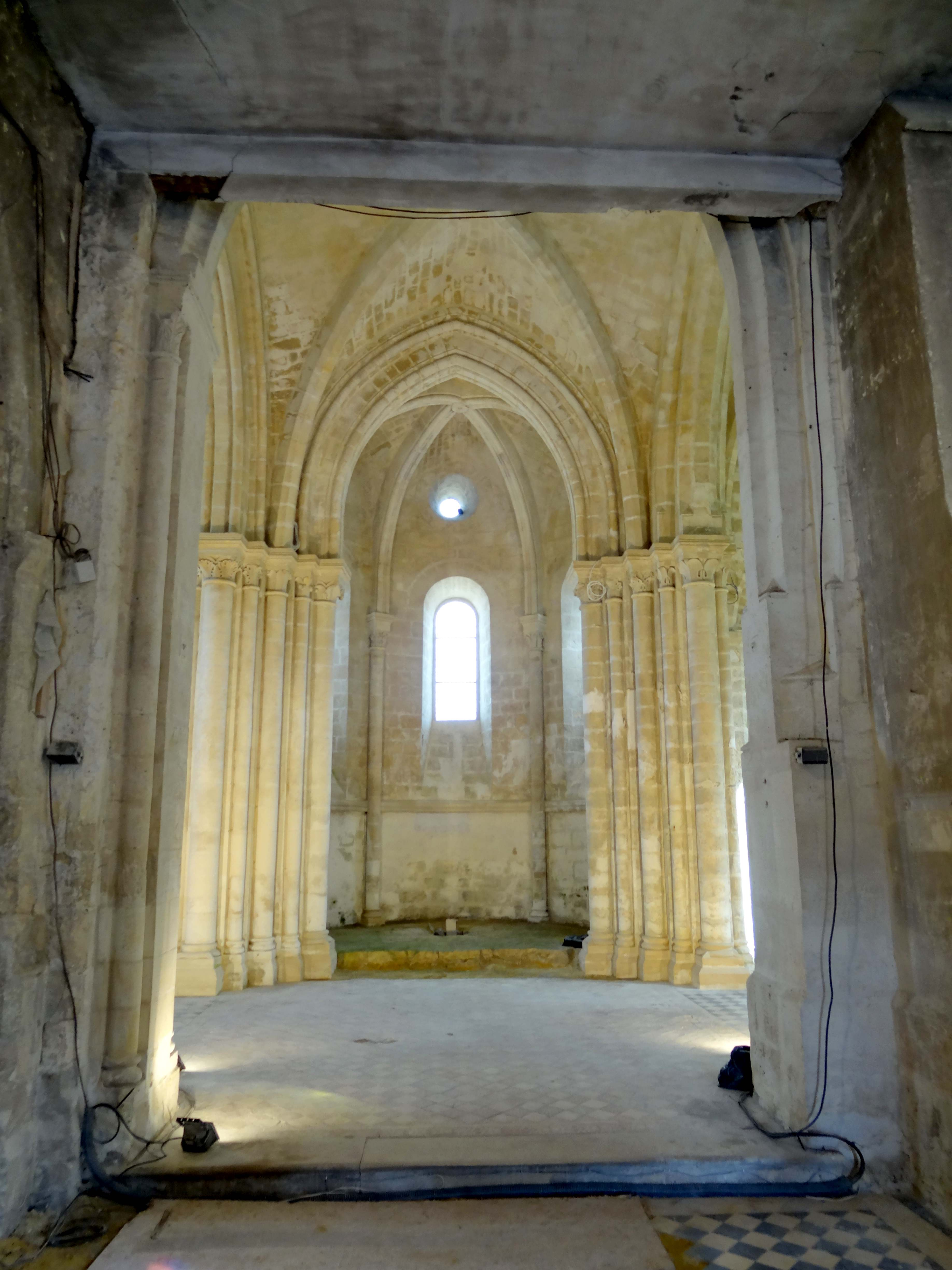 Intérieur de l'église - voir titre.